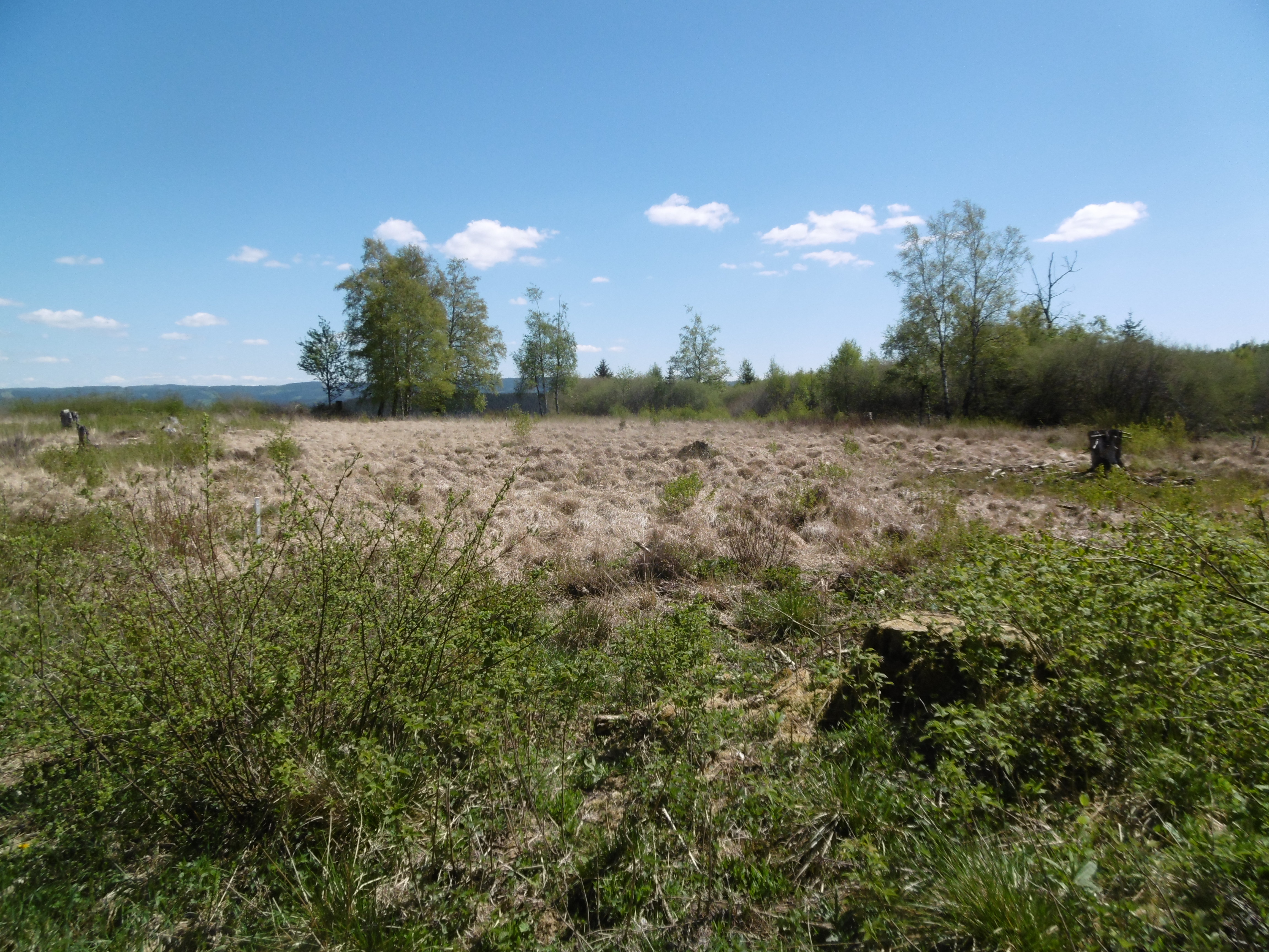 Moorbereich im Naturschutzgebiet Plästerlegge – Auf’m Kipp​ im Stadtgebiet Olsberg (LP Olsberg, HSK-260).